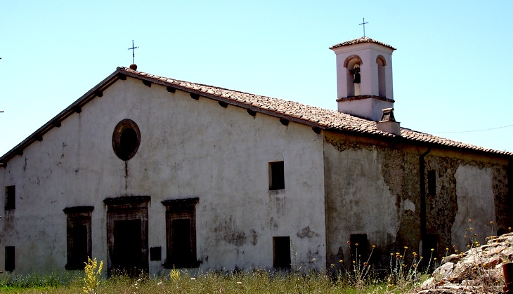 La Chiesa di San Gregorio Magno alla Villa Sforzesca nei pressi di Castell'Azzara (GR), Tuscany (Italy)